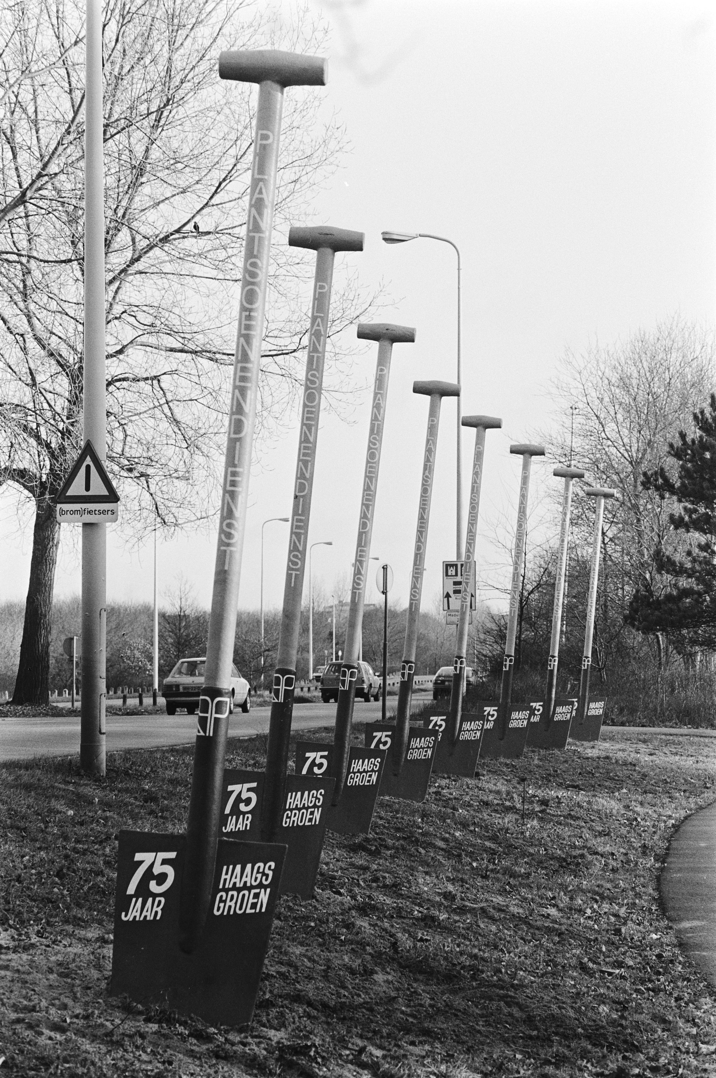 Collectie / Archief : Fotocollectie Anefo Reportage / Serie : [ onbekend ] Beschrijving : Kunstwerk van acht gigantische schoppen in de Scheveningse Bosjes, ter gelegenheid van het 75-jarig bestaan van de Haagse Plantsoenendienst Datum : 18 januari 1983 Locatie : Den Haag, Zuid-Holland Trefwoorden : groenvoorziening, jubilea, kunstwerken Fotograaf : Antonisse, Marcel / Anefo Auteursrechthebbende : Nationaal Archief Materiaalsoort : Negatief (zwart/wit) Nummer archiefinventaris : bekijk toegang 2.24.01.05 Bestanddeelnummer : 932-4688